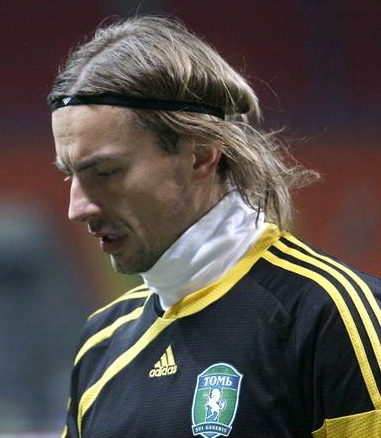 Sergei Pareiko, Estonian goalkeeper.